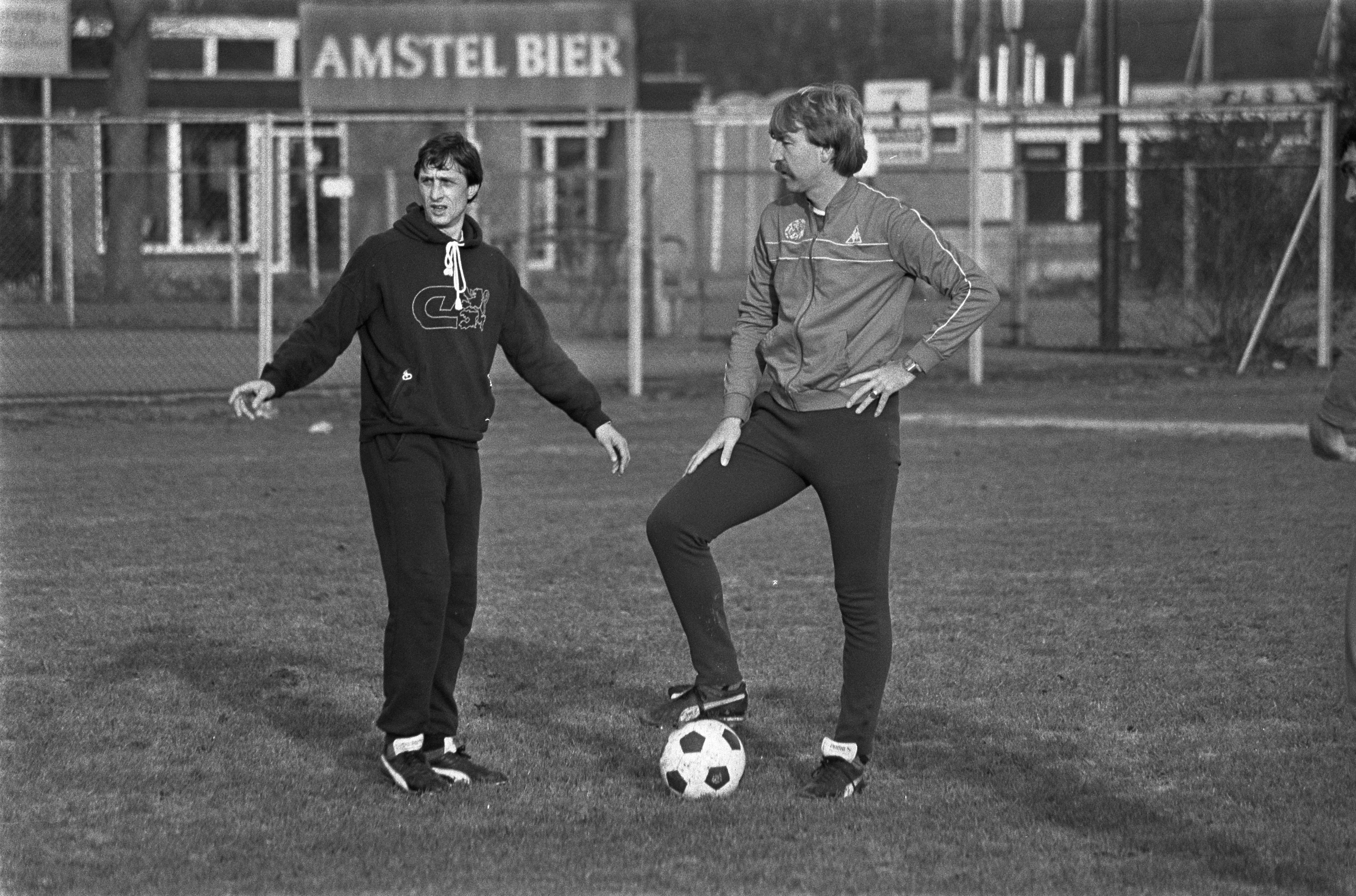 Collectie / Archief : Fotocollectie Anefo Reportage / Serie : Training Ajax met Johan Cruyff Beschrijving : Johan Cruijff (links) met hulptrainer Aad de Mos Datum : 3 december 1981 Locatie : Amsterdam, Noord-Holland Trefwoorden : sport, trainers, voetbal Persoonsnaam : Cruijff, Johan, Mos, Aad de Fotograaf : Antonisse, Marcel / Anefo Auteursrechthebbende : Nationaal Archief Materiaalsoort : Negatief (zwart/wit) Nummer archiefinventaris : bekijk toegang 2.24.01.05 Bestanddeelnummer : 931-8418